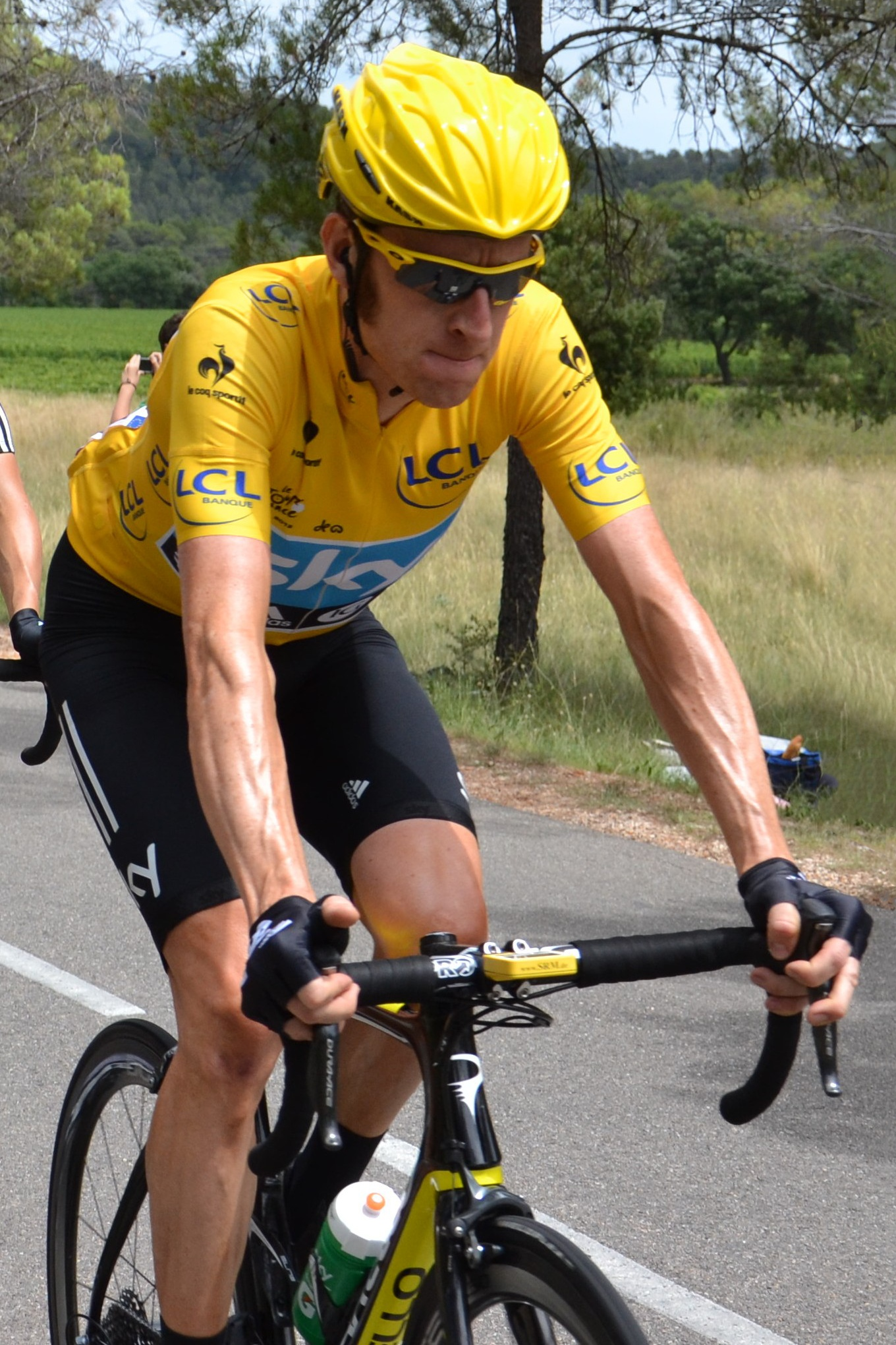 Bradley Wiggins lors de la 13e étape du Tour de France 2012.